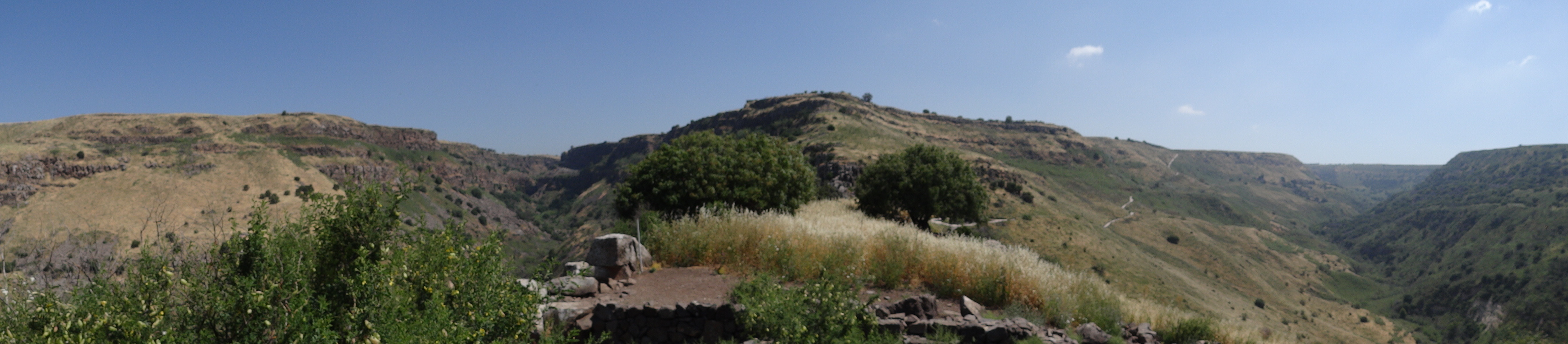 Gamla Nature reserv in Golan Heights גמלא היא שמורת טבע ואתר ארכאולוגי במרכז רמת הגולן, כ-20 קילומטרים דרומית לקצרין. מימים נחל דליות, משמאל נחל גמלא. תצלום מגמלא העתיקה